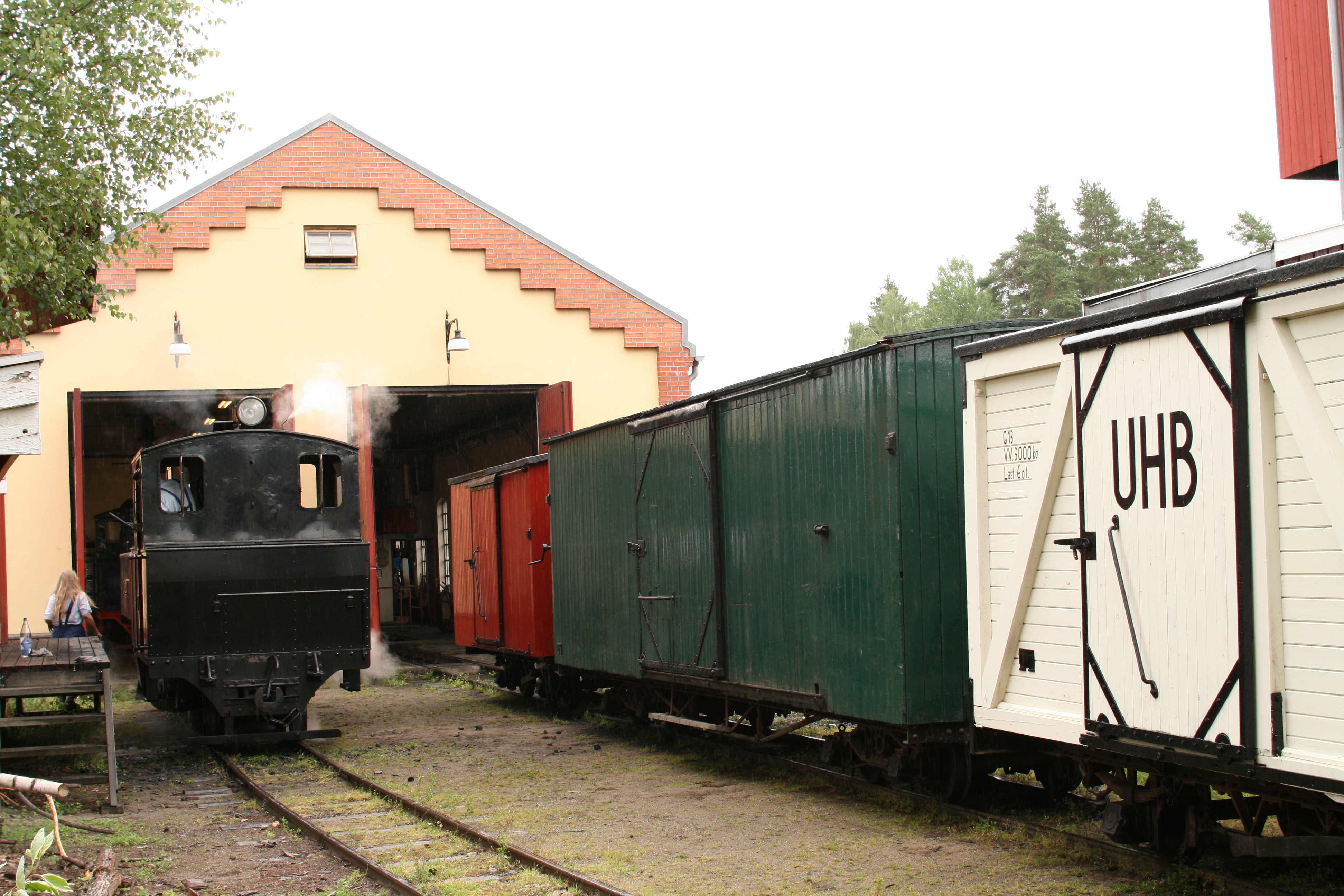 Lokstallbygning og lokstallområde på Sørumsand stasjon. Lokstallen er verksted for Urskog-Hølandsbanens rullende materiell. Bildet er fra 2009.